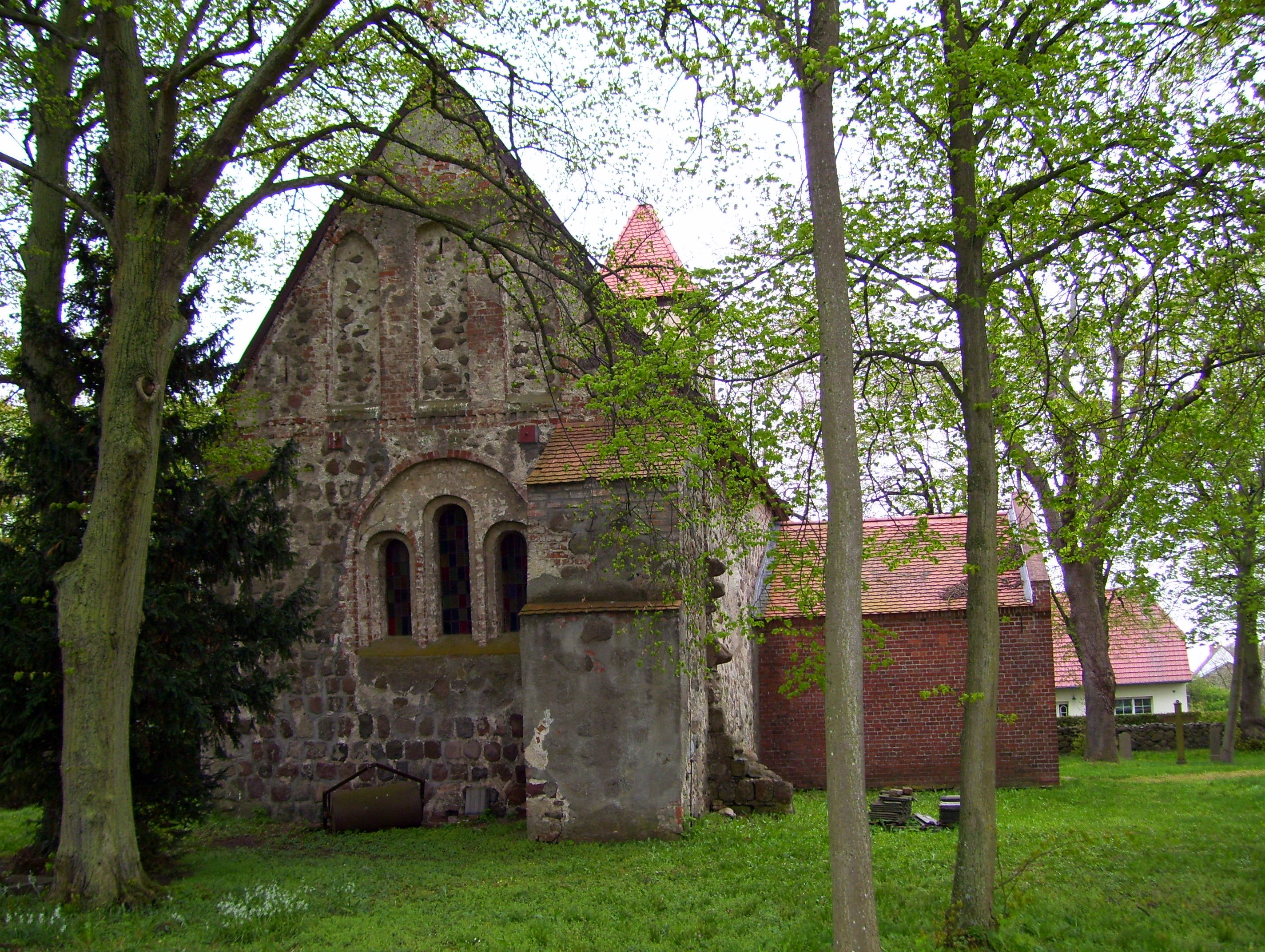 Ostgiebel der Kirche in Sanzkow, Gemeinde Siedenbrünzow, Landkreis Demmin